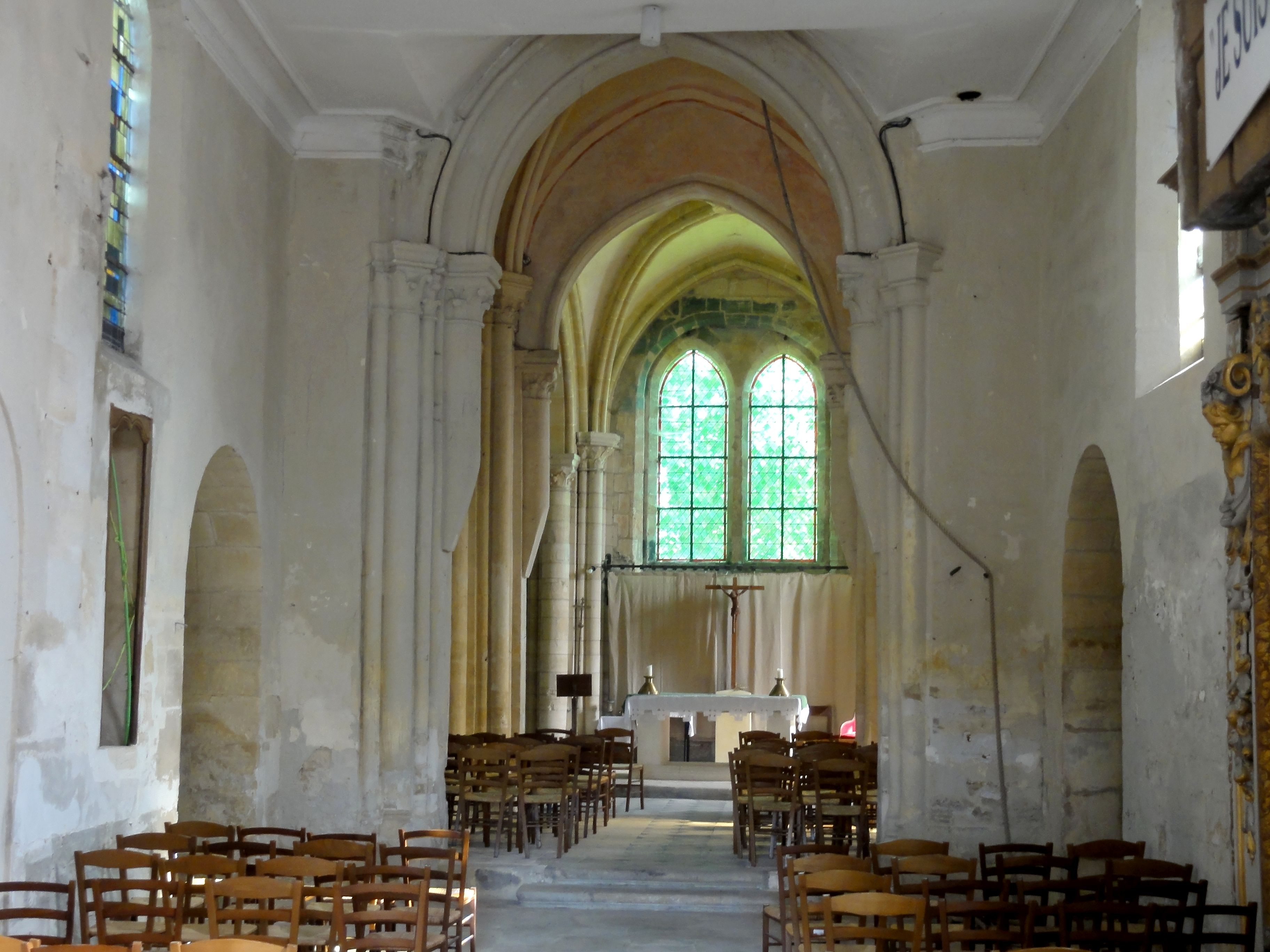 Vue intérieure.